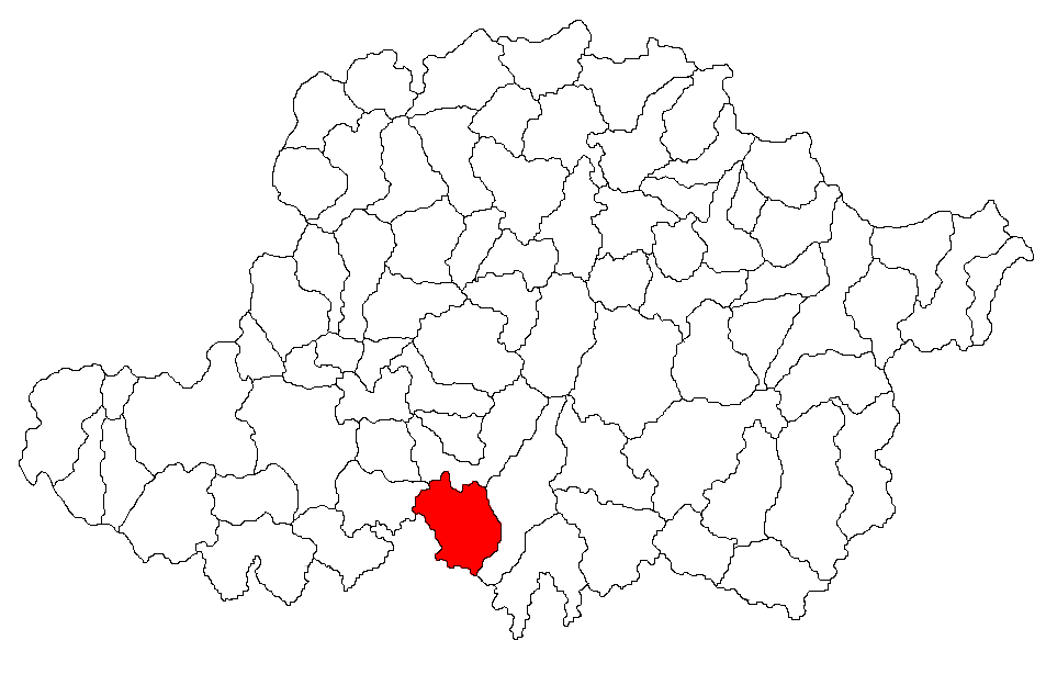 Categorie:Hărţi ale judeţului Arad